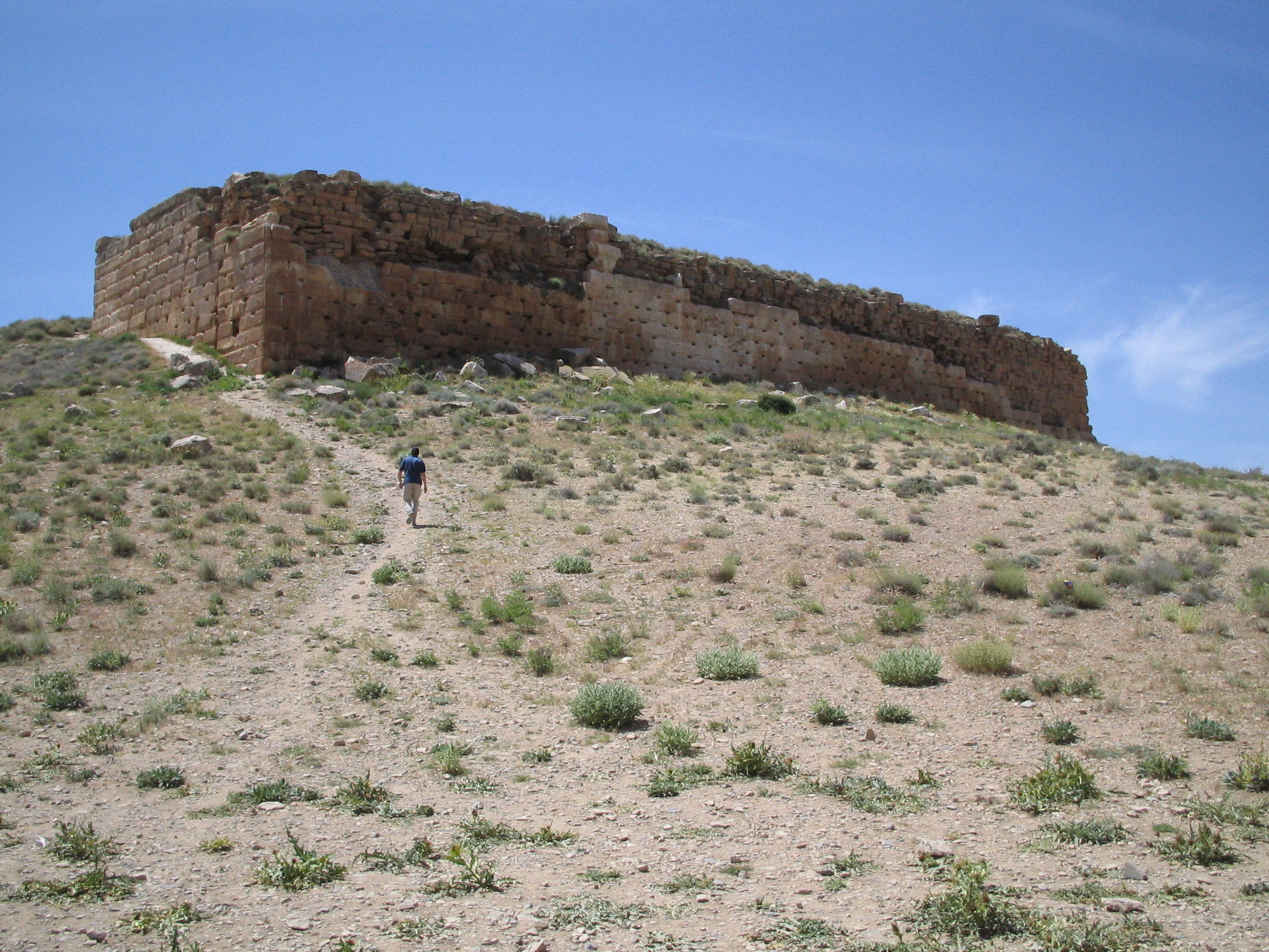 Citadel in Pasargades.